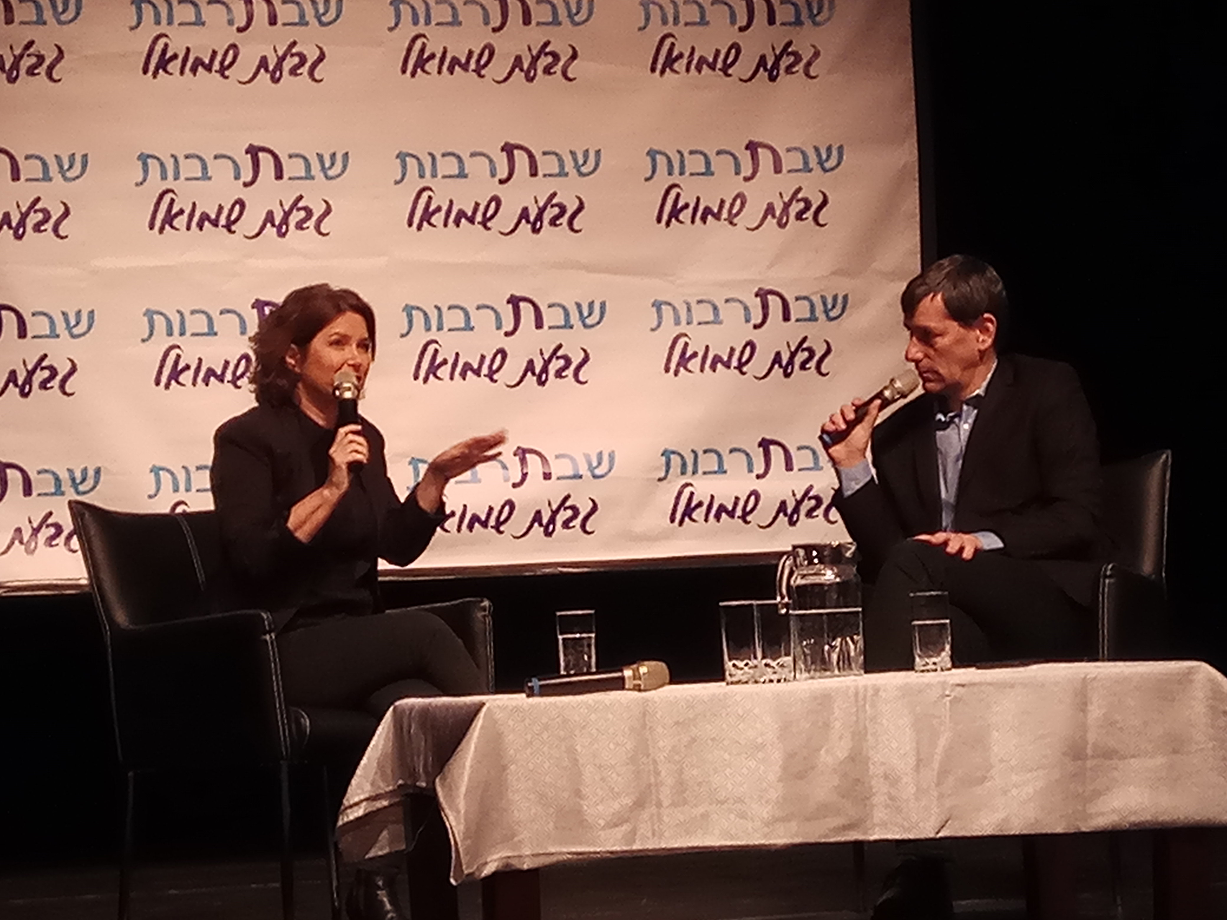 יואב לימור מראיין את מיכל רוזין בשבתרבות בגבעת שמואל